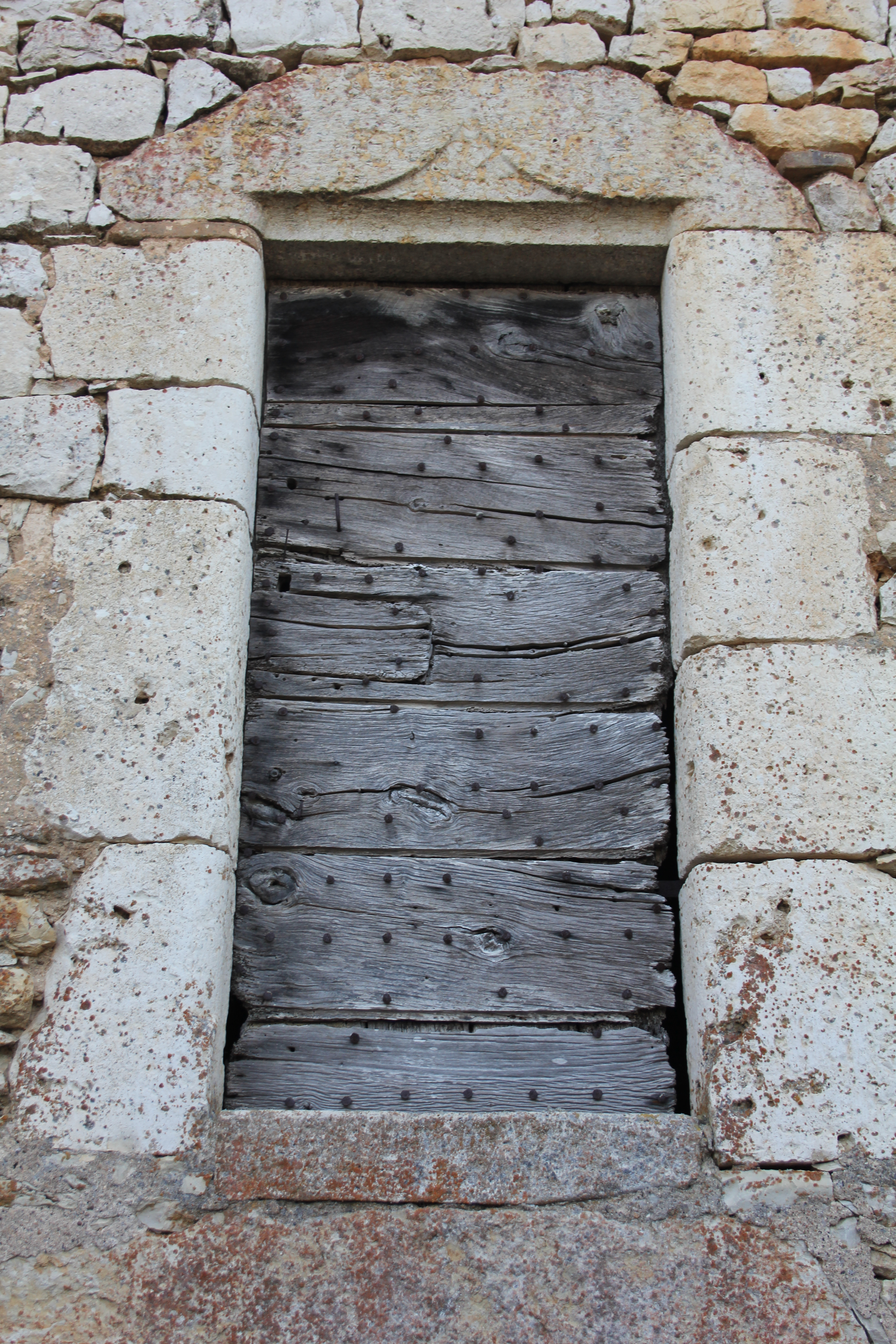 Porte de la plus ancienne Maison du bourg du Montat-Lot-France.